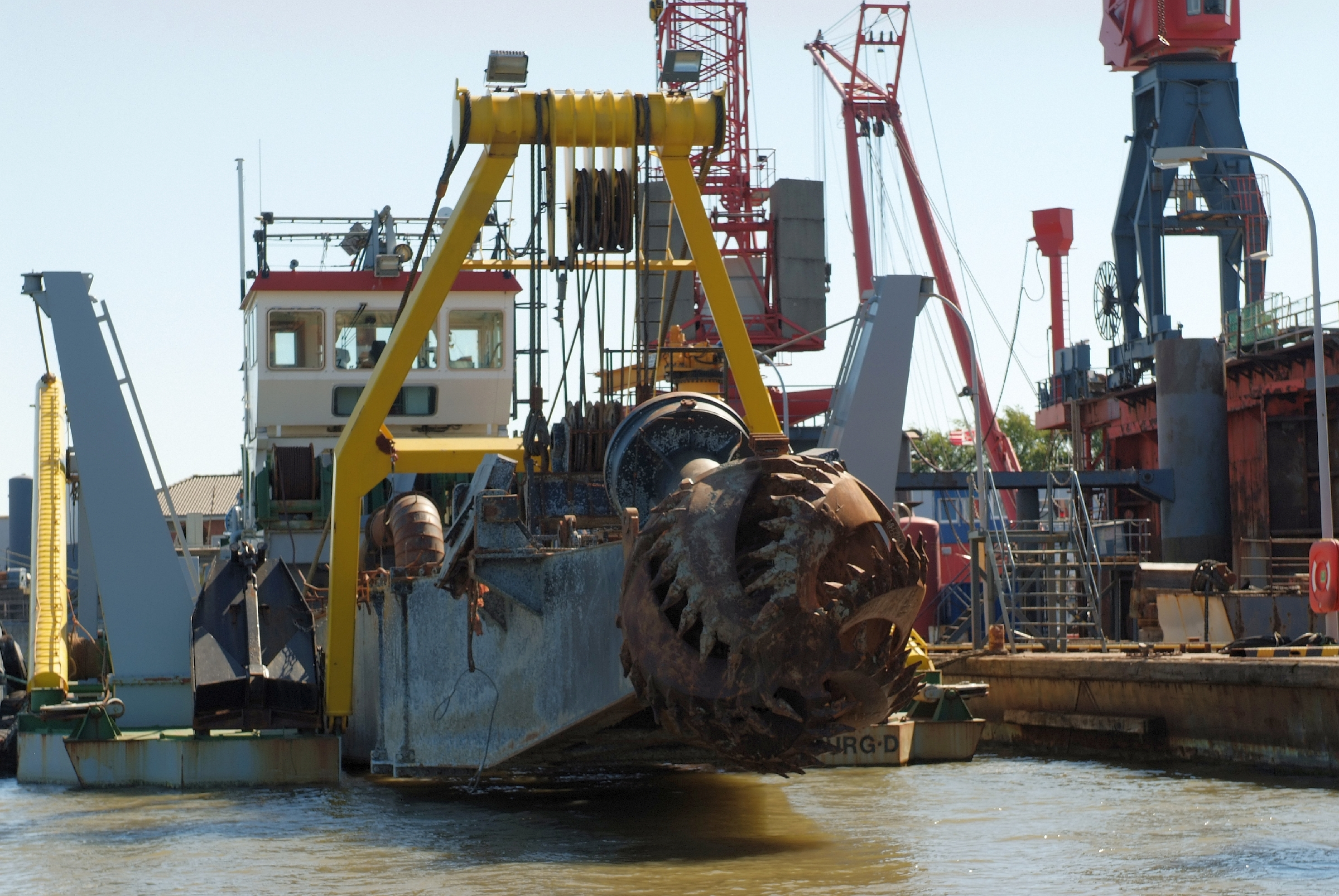 im Hafen von Cuxhaven